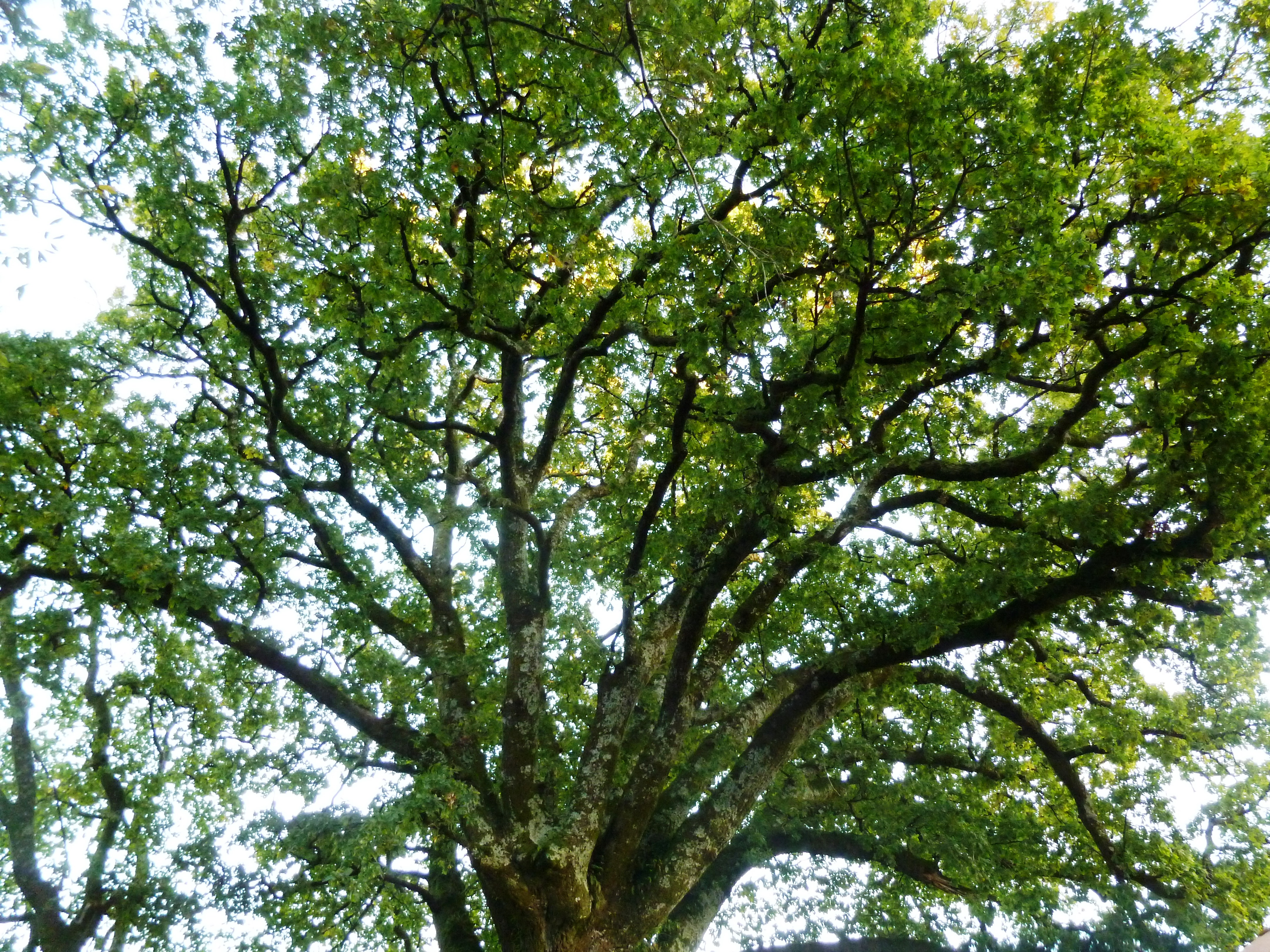 Detalle do Carballo da Casa Grande de Buciños, Carballedo